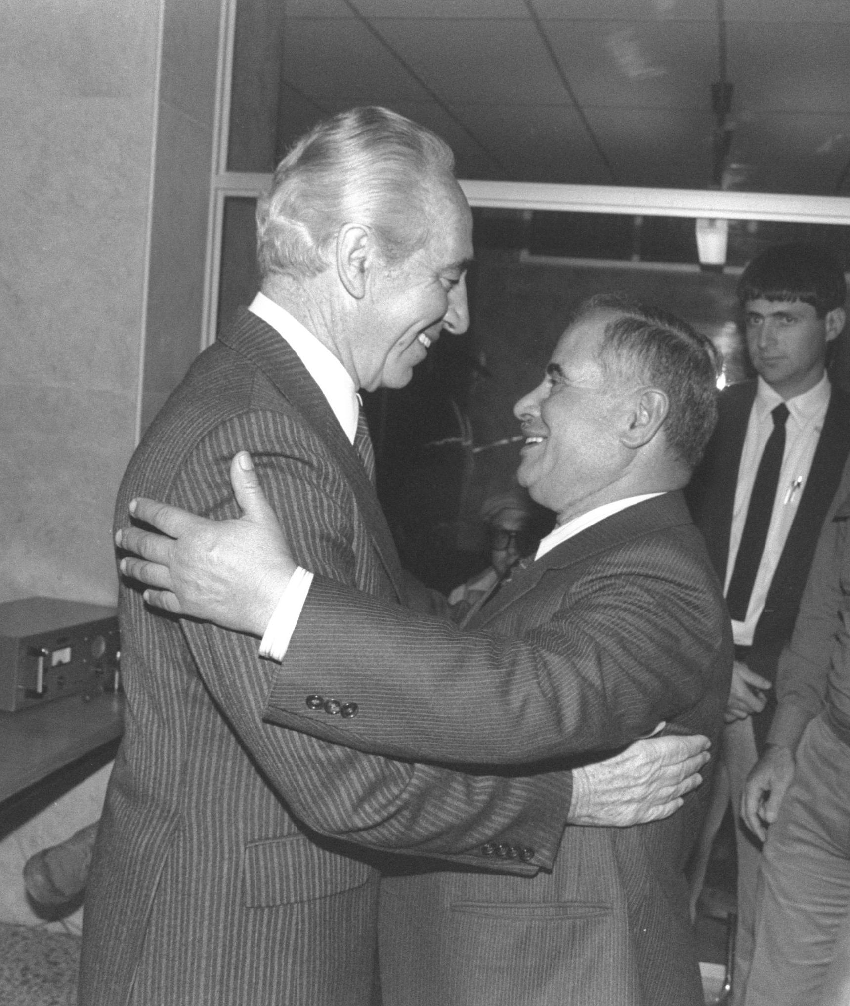 Bethlehem mayor Elias Freij Greeting P.M. Shimon peres, israel's first p.M. To attend the mayor's annual christmas eve cocktail party in bethlehem (24/12/1984). ראש עיריית בית לחם אליאס פרייג' מקבל את פני ראש הממשלה שמעון פרס למסיבת הקוקטייל לכבוד חג המולד בבית לחם. Photo: HARNIK NATI.